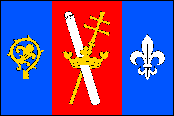 vlajka, Olšany, okres Šumperk